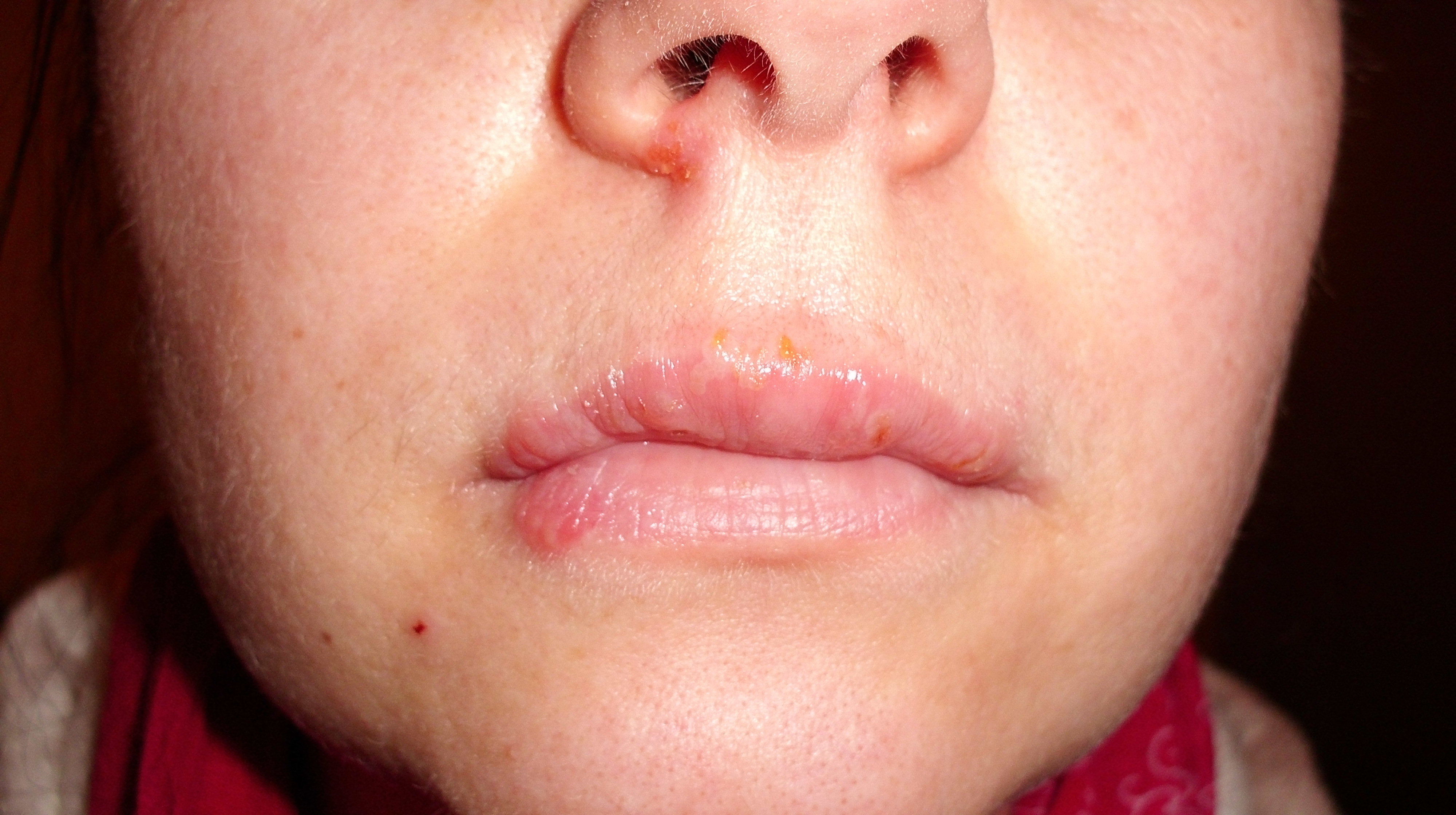 Herpesbläschen an den Lippen, Fieberblase